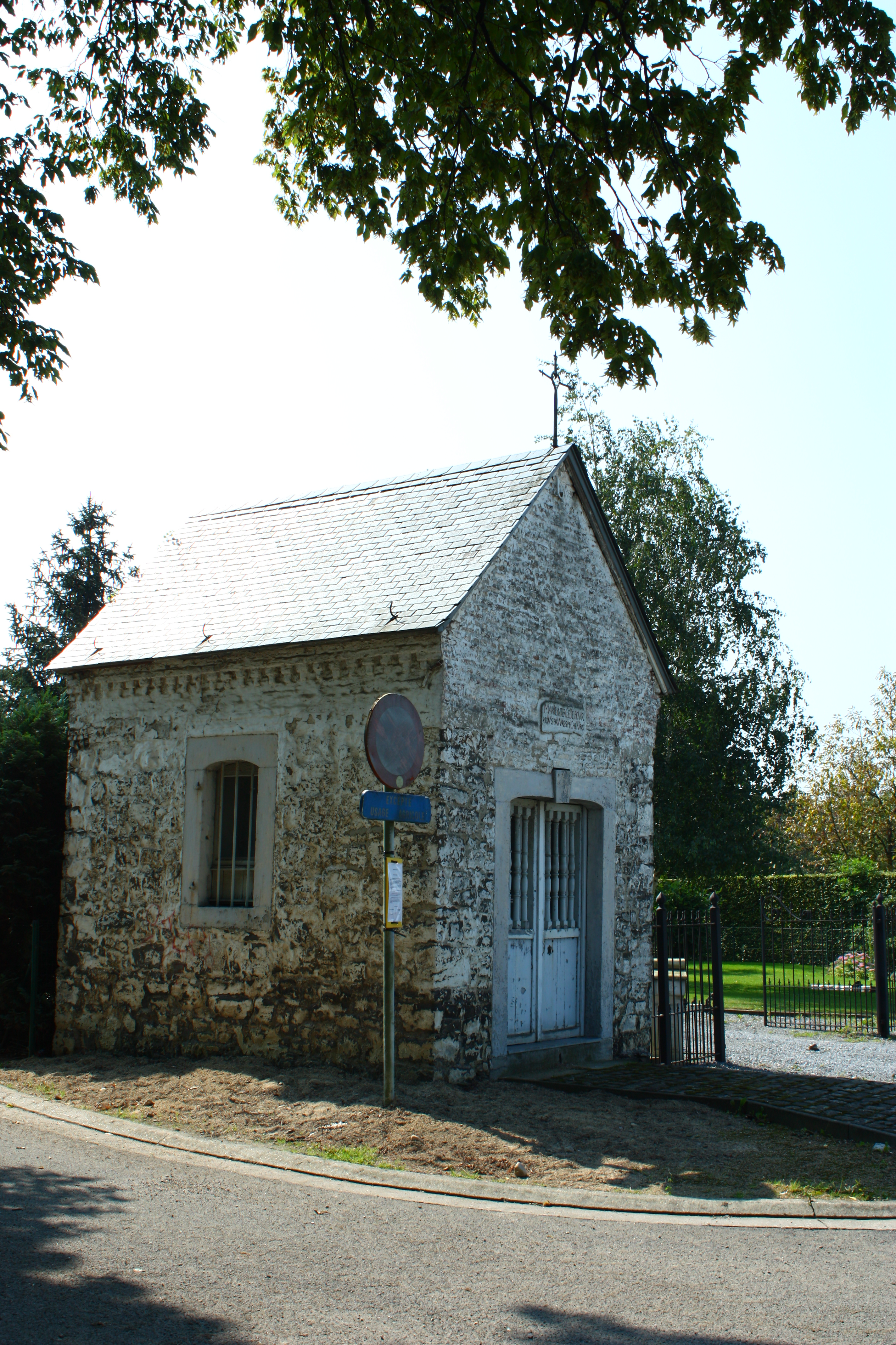 La Chapelle Notre-Dame de Bon Secours située à Hermalle-sous-Argenteau, dans la province de Liège, en Belgique. Monument classé n°62108-CLT-0019-01.